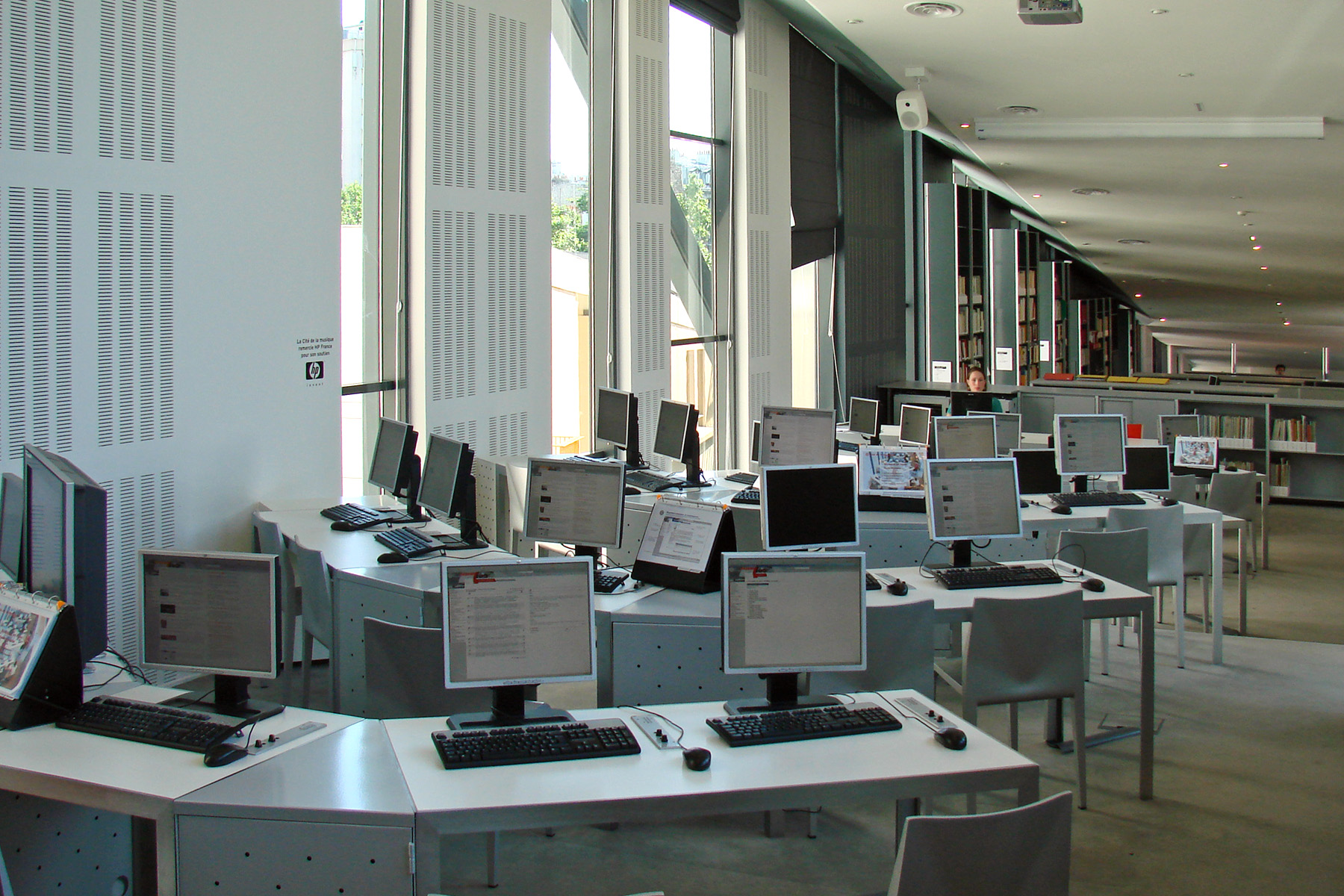 Salle de consultation en ligne d'une médiathèque parisienne.